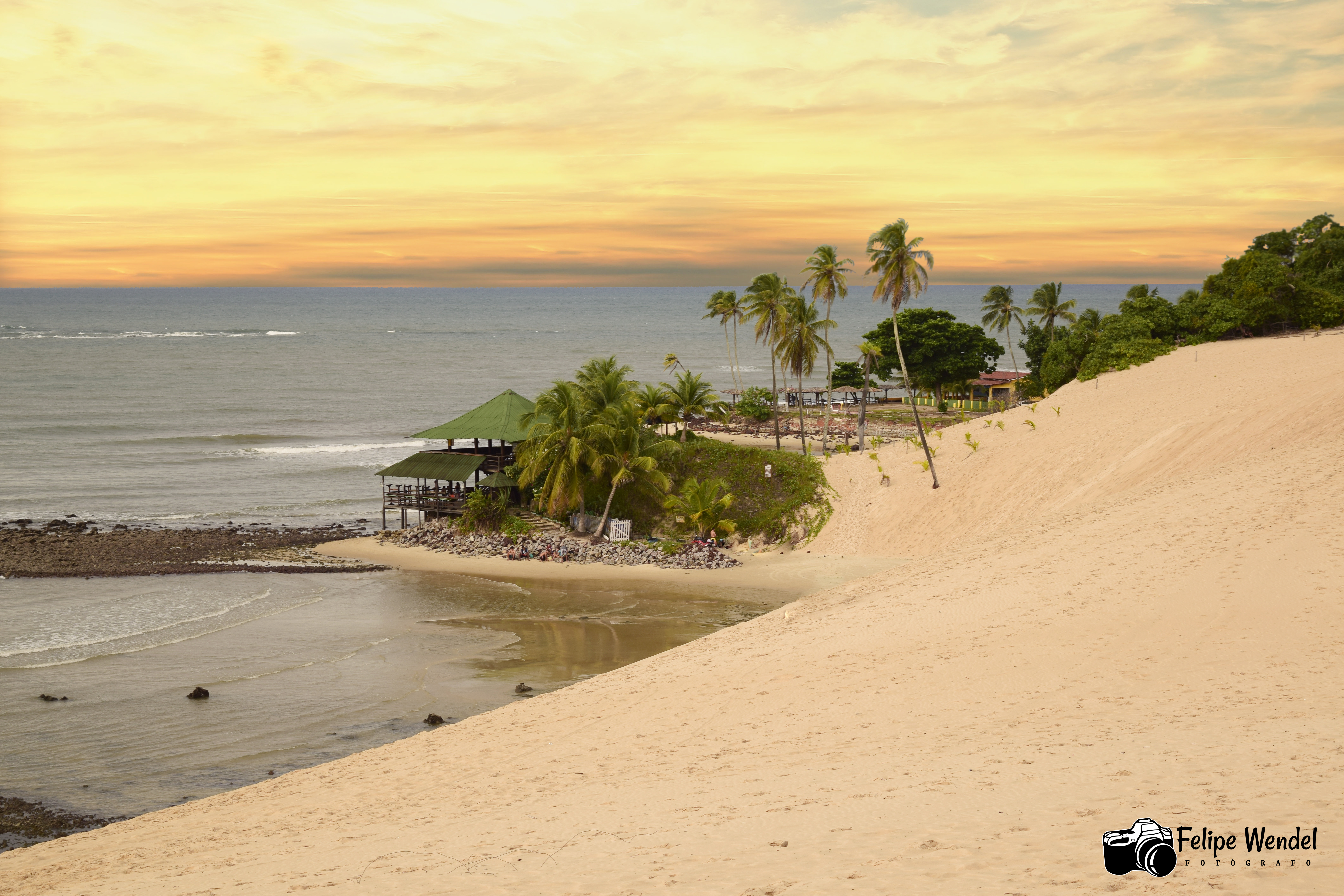 Praia de Jenipabu - Extremoz - RN - Brasil - 2020 Foto por Felipe Wendel | @FelipeWendelFotografo